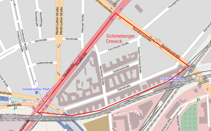 Umriss des Gebiets des Schöneberger Dreiecks